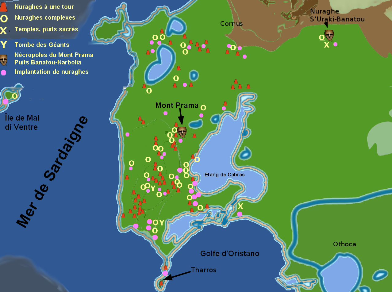 Site archéologique de Sinis